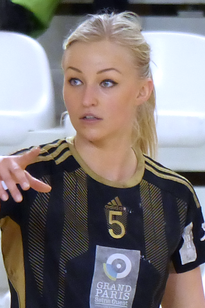 Stine Bredal Oftedal la demi-centre de Issy Paris Hand lors du match retour du 1/4 de finale des playoffs face à Union Mios Biganos-Bègles le 30 avril 2014.